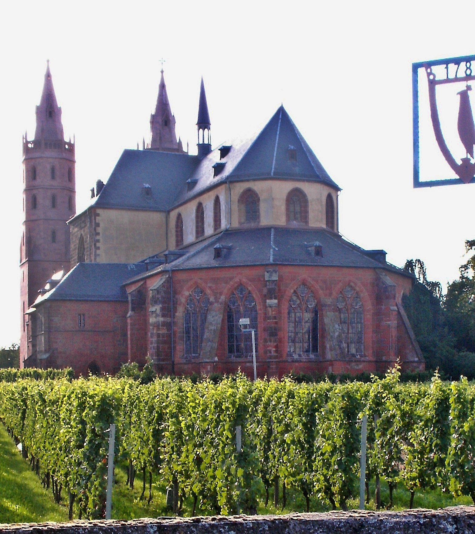 Liebfrauenkirche Worms, von Osten, mit Weinbergen